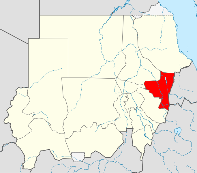 Locator map